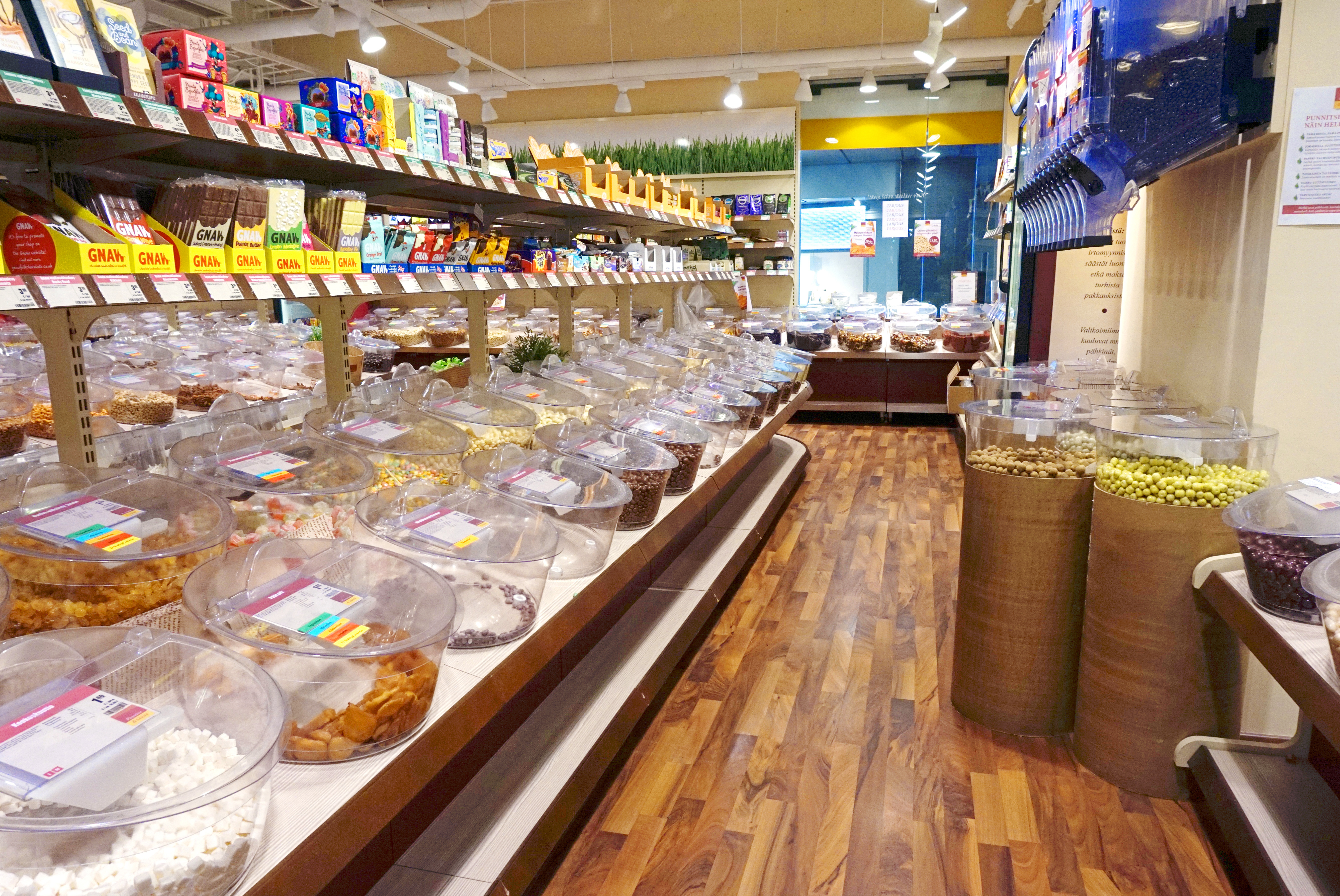 Punnitse ja säästä -liike Jyväskylän keskustassa.This photograph was taken with a Sony ILCE-5000